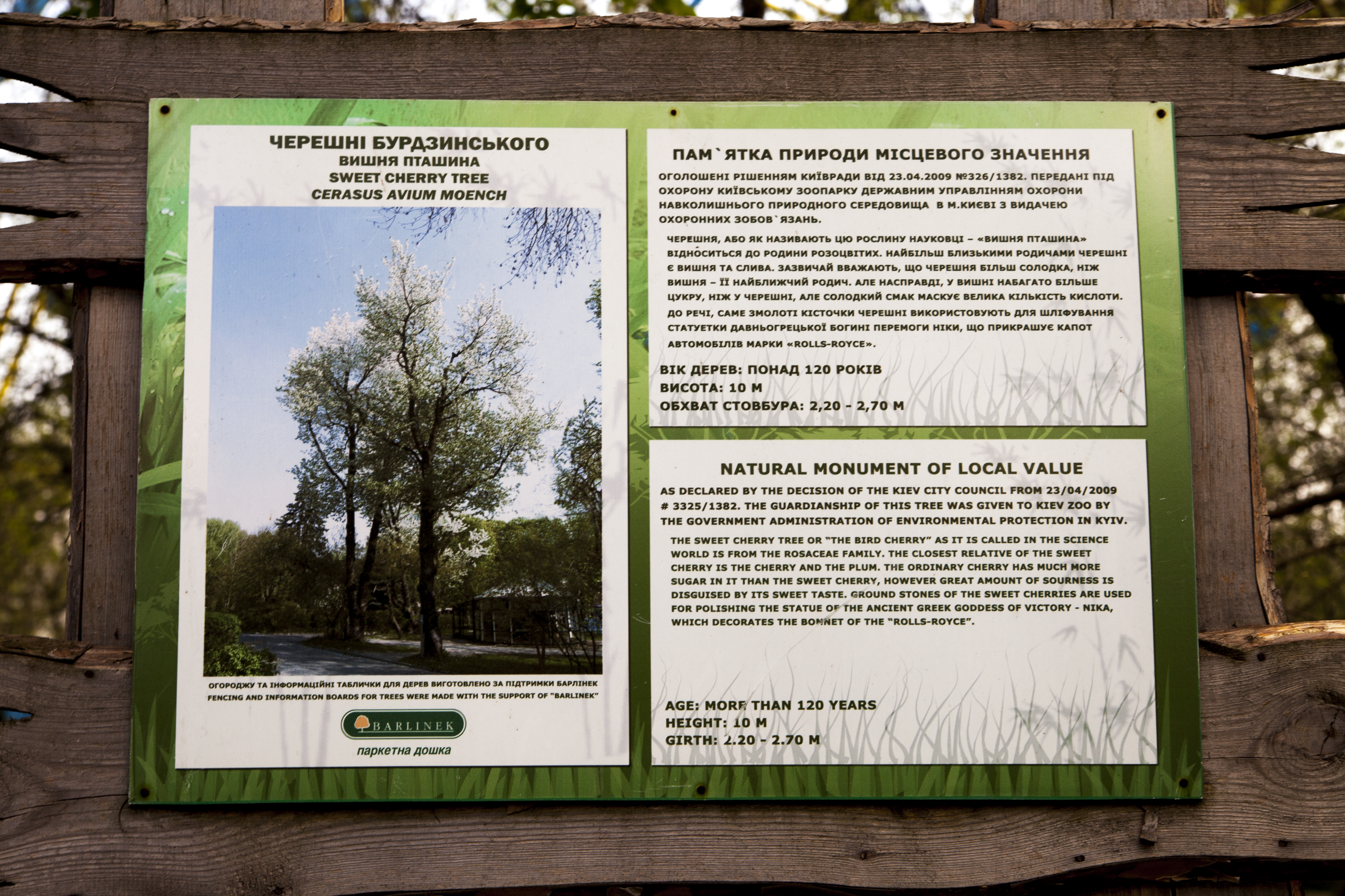 Більш, ніж 120 років. Обсяг 2,2—2,7 м. Висота 10 м. Найстаріші черешні Києва. У 2008 році проведене лікування.